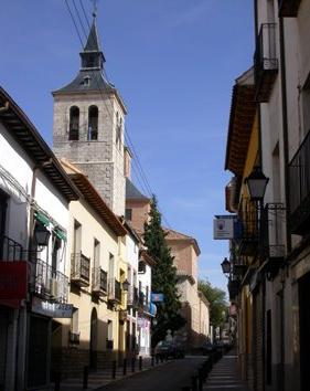 Iglesia de Arganda